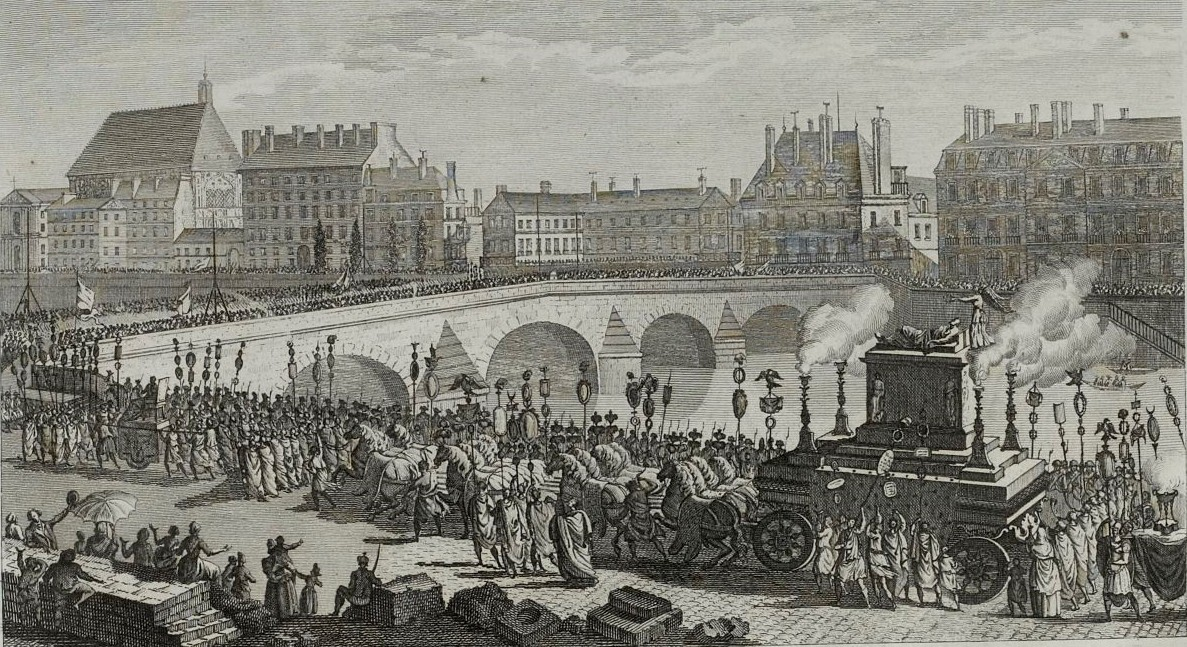 Estampe: transfert de Voltaire au Panthéon le 11 juillet 1793.